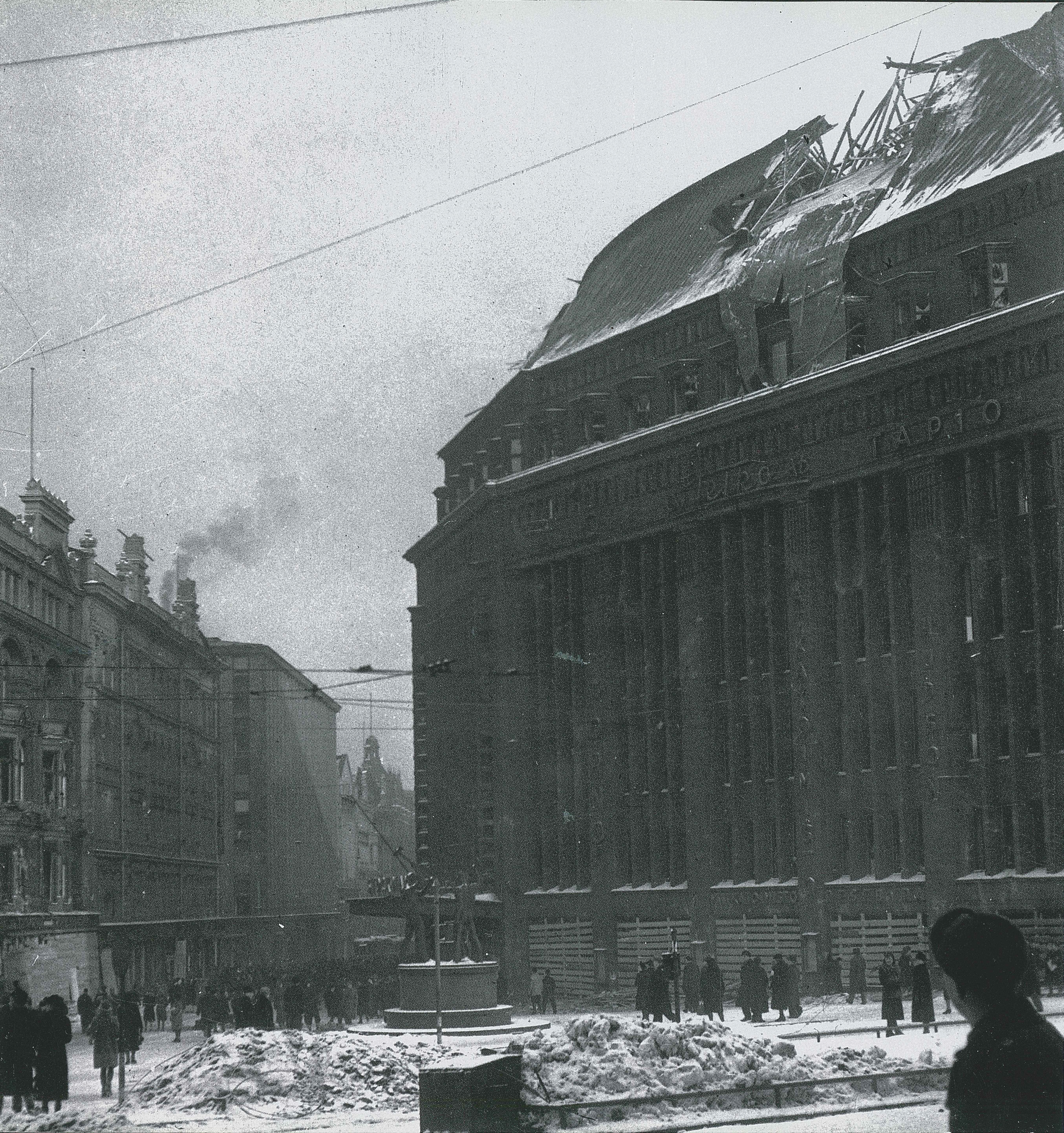 Stockmannin tavaratalo Helsingin suurpommitusten jälkeisenä päivänä 26.02.1944.